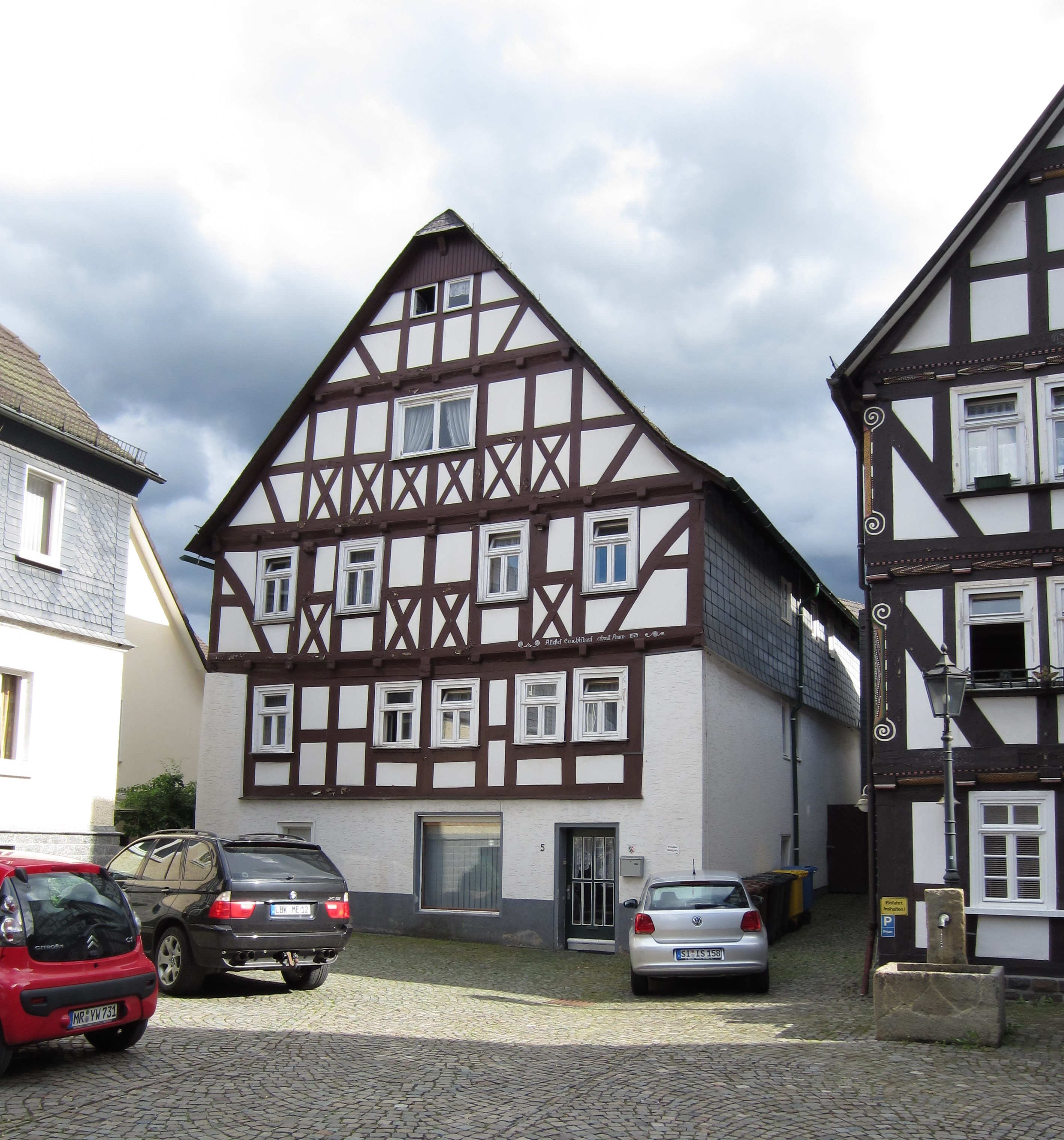 Das denkmalgeschützte Fachwerkhaus in der Wallstraße 5 in Bad Laasphe im Jahr 2011 (vielleicht 16. Jahrhundert)